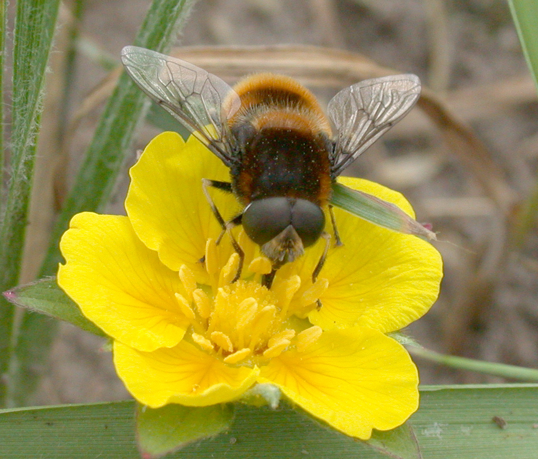 Eristales intricaria